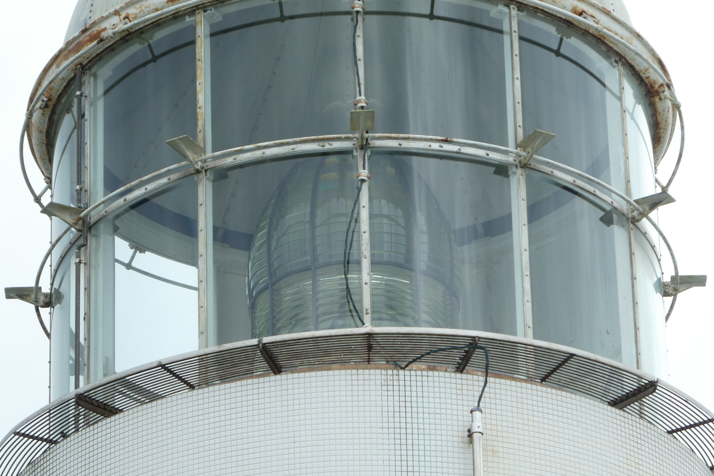 葛登支岬灯台のレンズ拡大